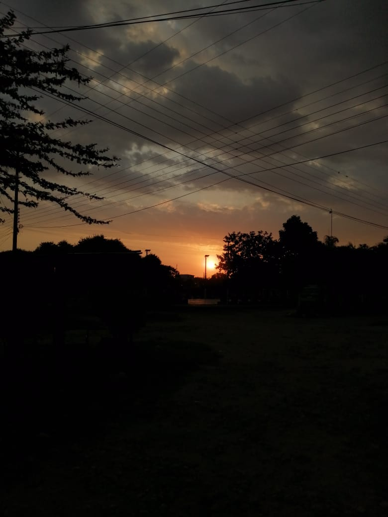 Atardecer llanero en tierras Araucanas.